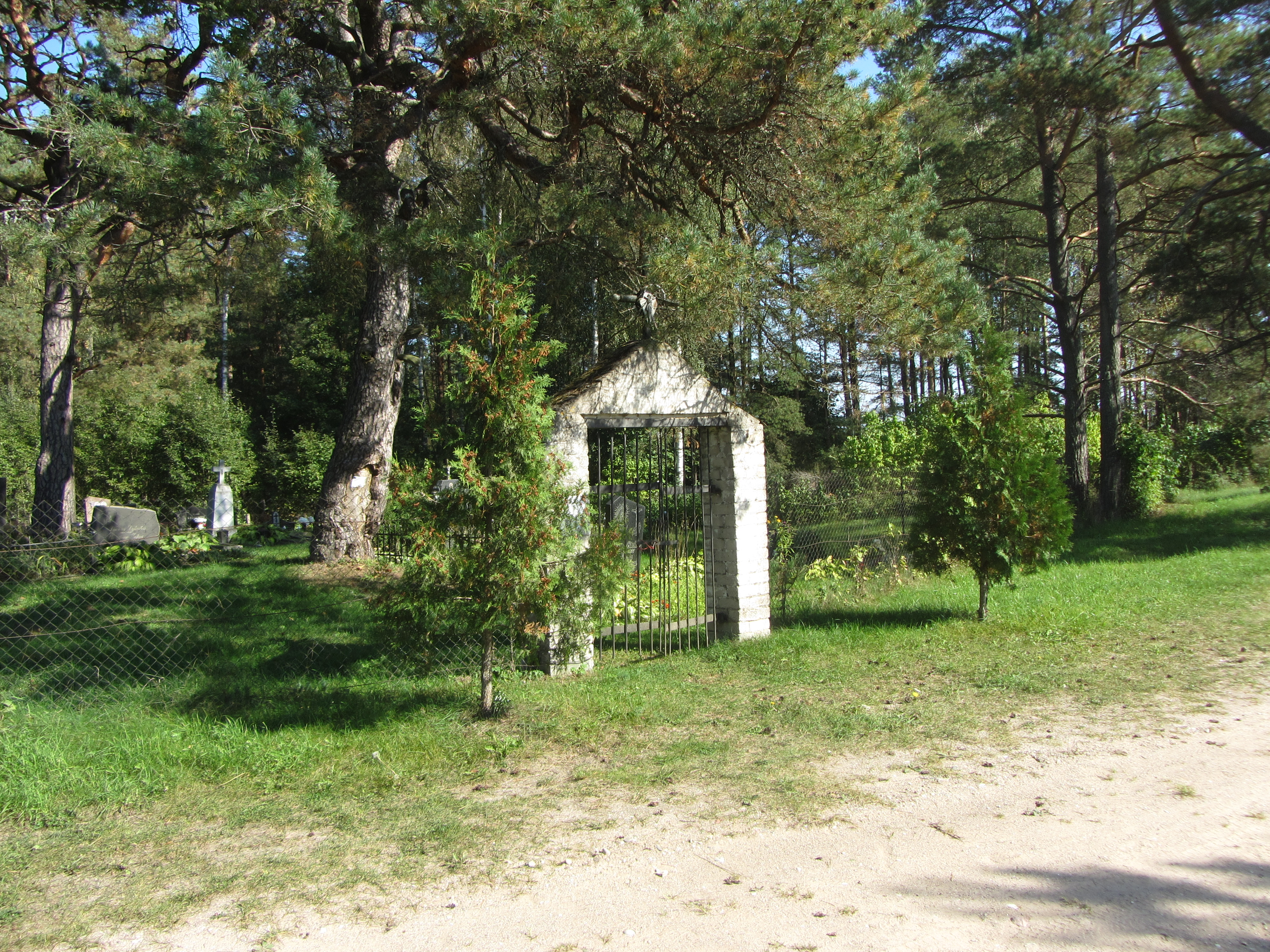 Grendavės sen., Lithuania